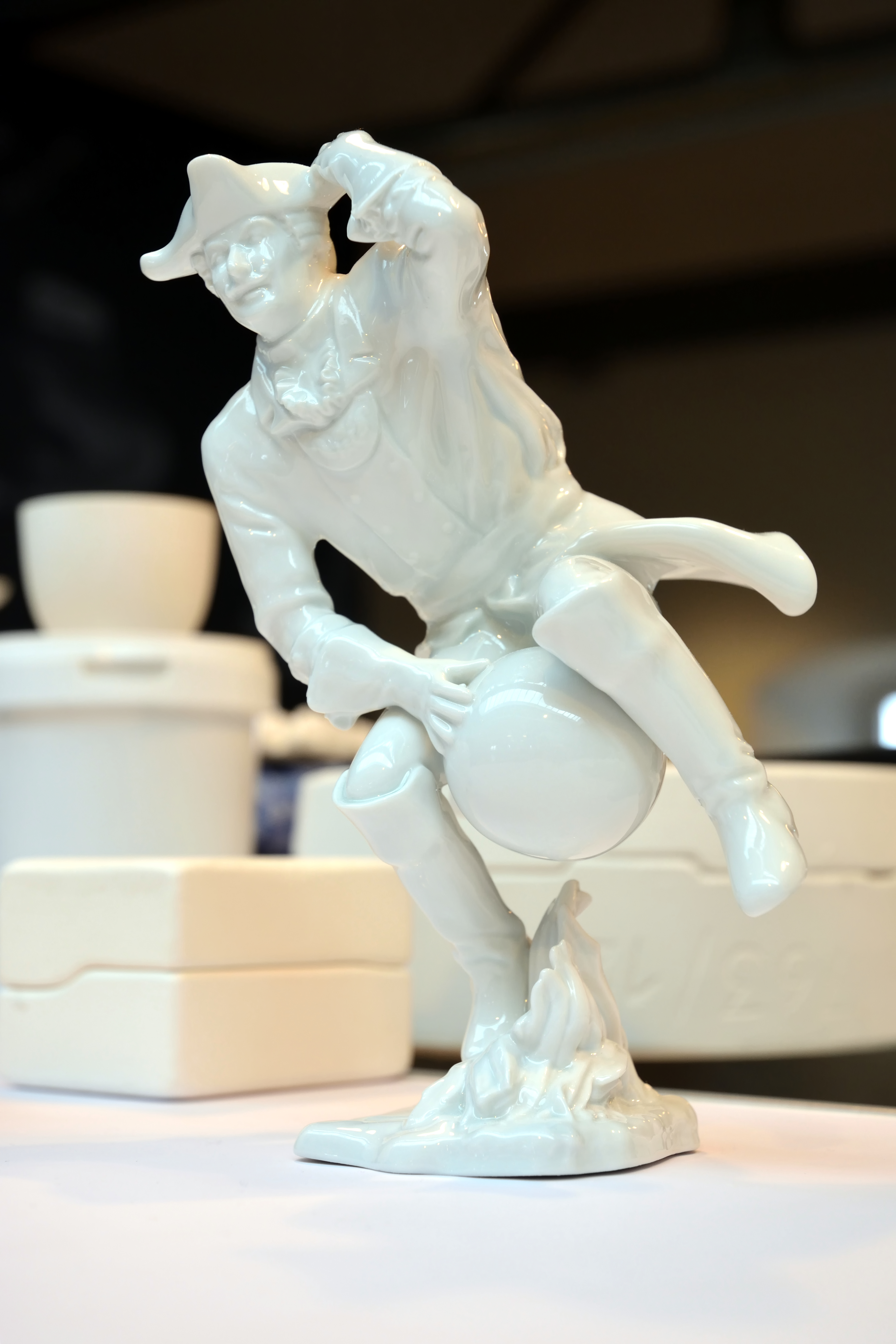 Impressionen vom Porzellanmuseum Schloss Fürstenberg Besucherwerkstatt, Station 2: Gießen (Motiv: Hieronymus Carl Friedrich von Münchhausen)